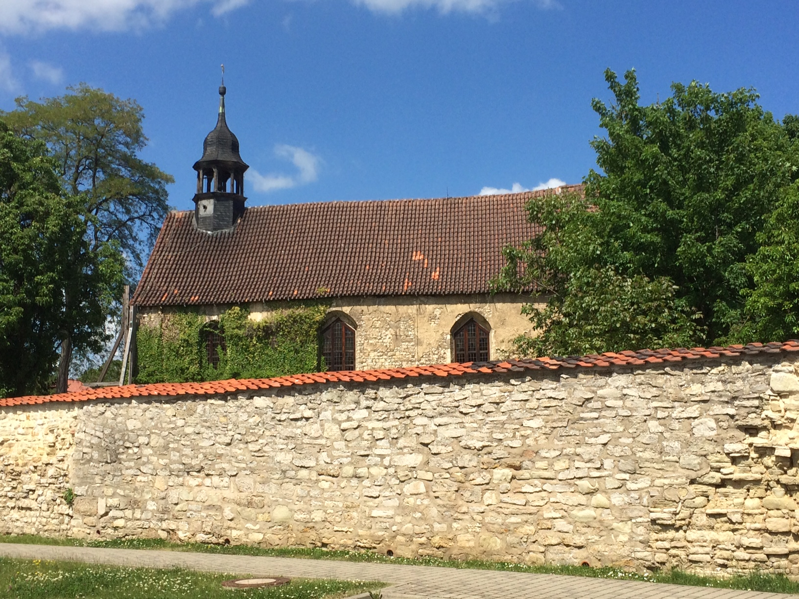 Kloster Schwanebeck